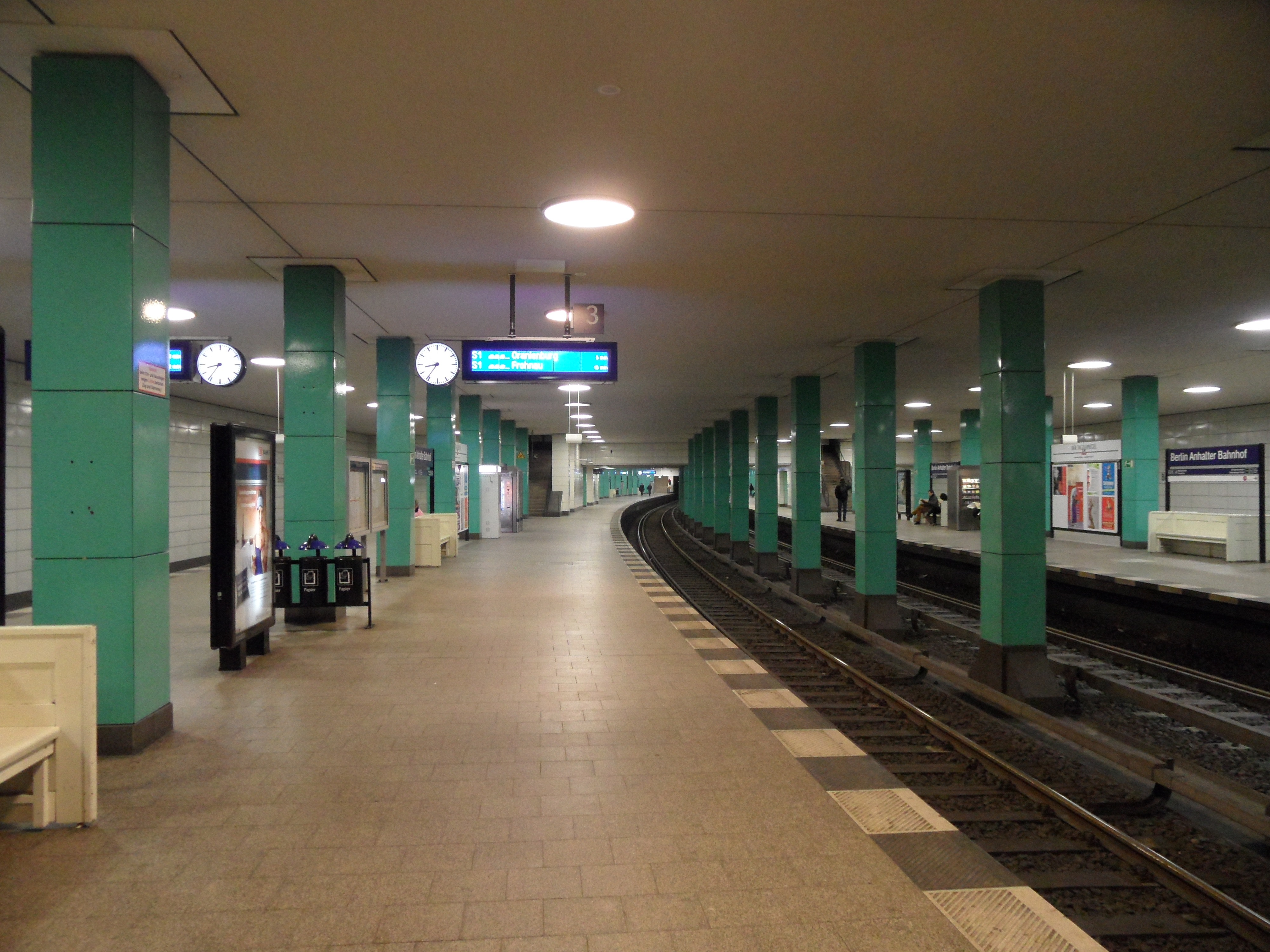 Berlin - S-Bahnhof Anhalter Bahnhof - Linien S1,S2,S25